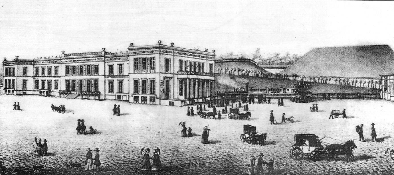 Empfangsgebäude des Bahnhofs Stettin.